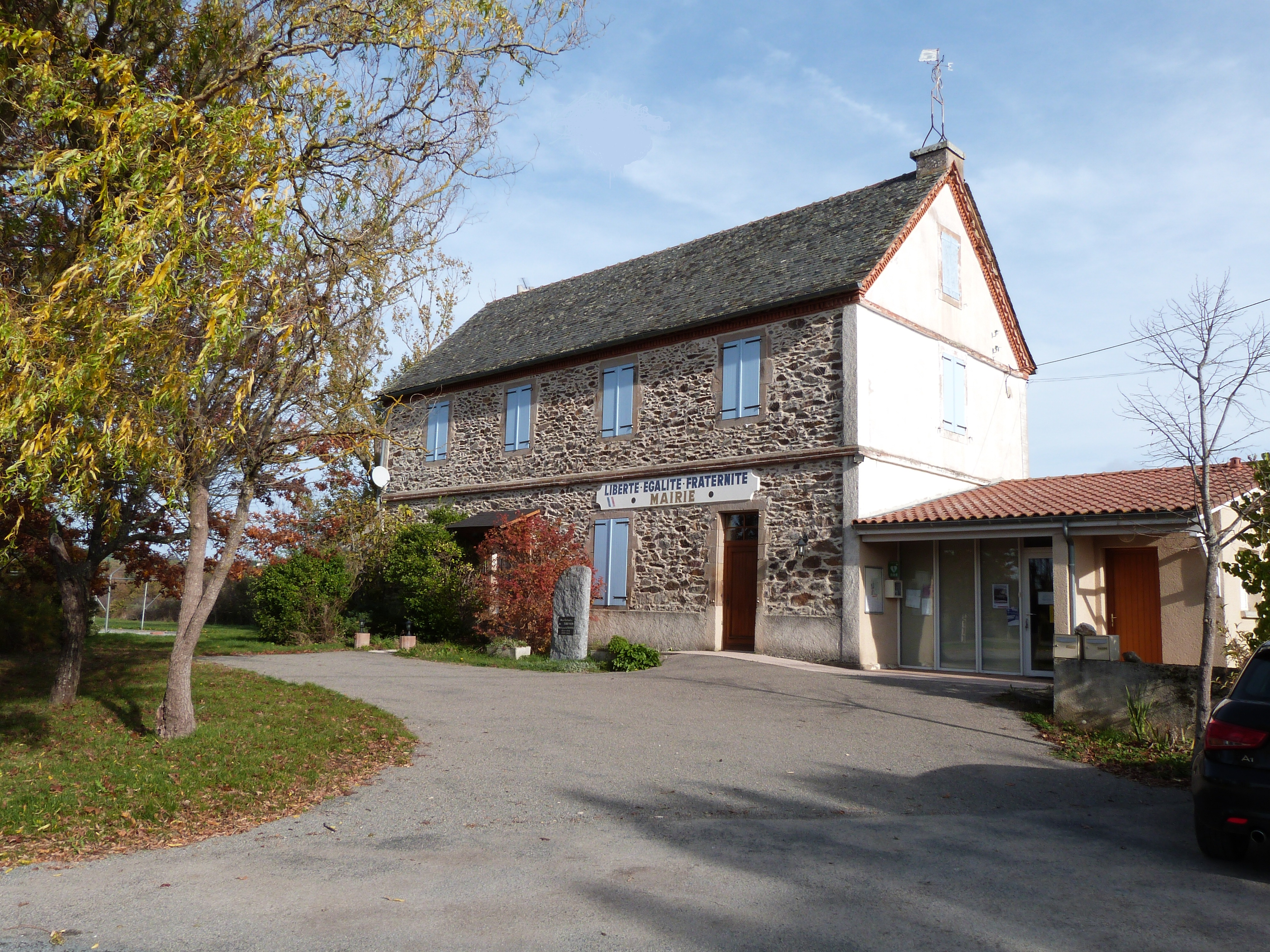 La mairie de Trévien se trouve au hameau de la Pastrié